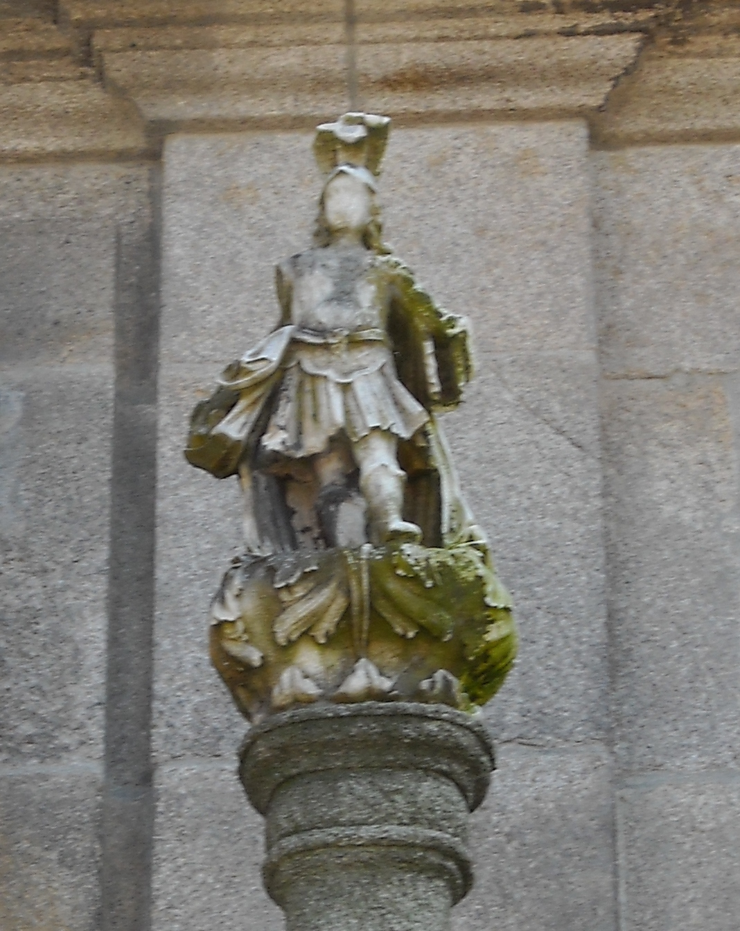 O arcanjo Miguel, anjo que dá nome ao Chafariz de São Miguel, localizado ao lado da Sé do Porto.